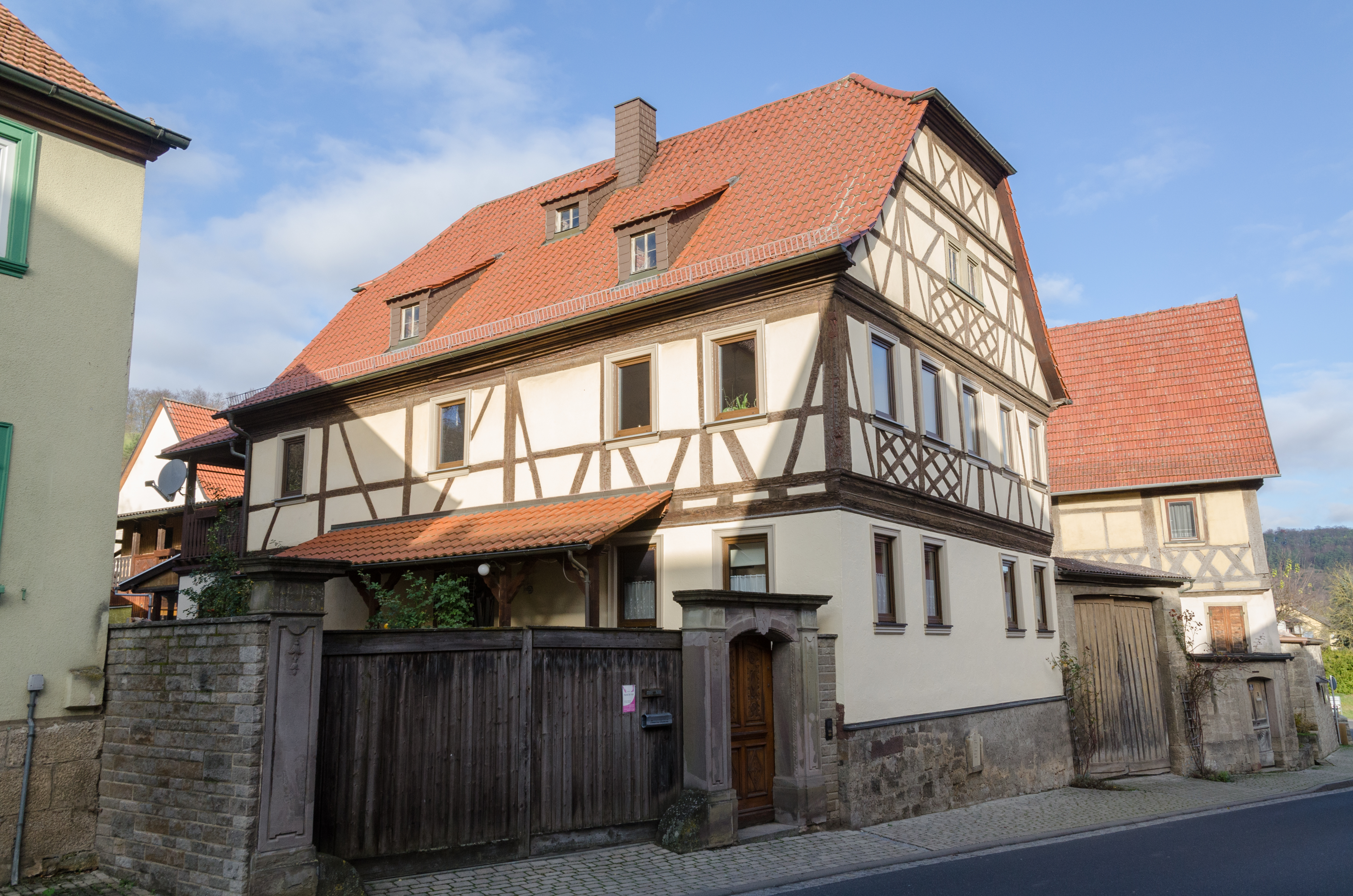 Sulzthal, Hauptstraße 4